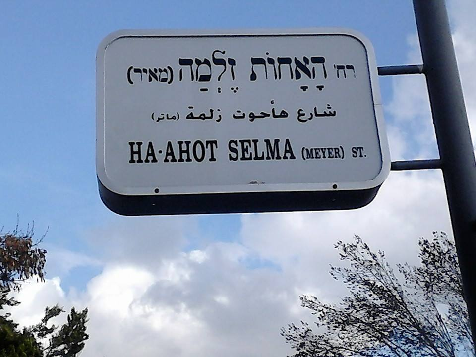 רחוב על שם האחות זלמה מאיר, "שוועסטר זלמה" האחות הראשית של בית החולים "שערי צדק" במשך למעלה מחמישים שנה.בנימוקיה כתבה ועדת השמות: "לא היתה כמותה לסעוד את החולים ולהנחות את האחיות הרבות שהיו תלמידותיה."